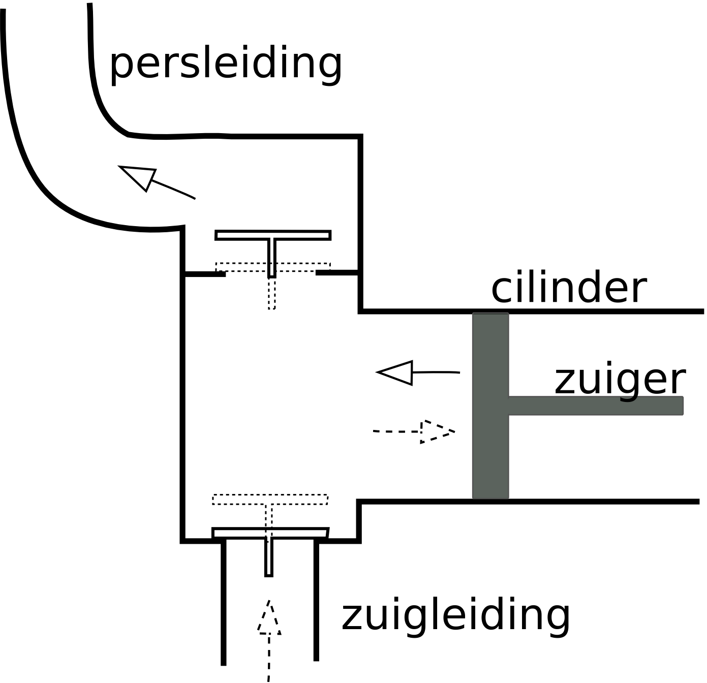 zelf, inkscape